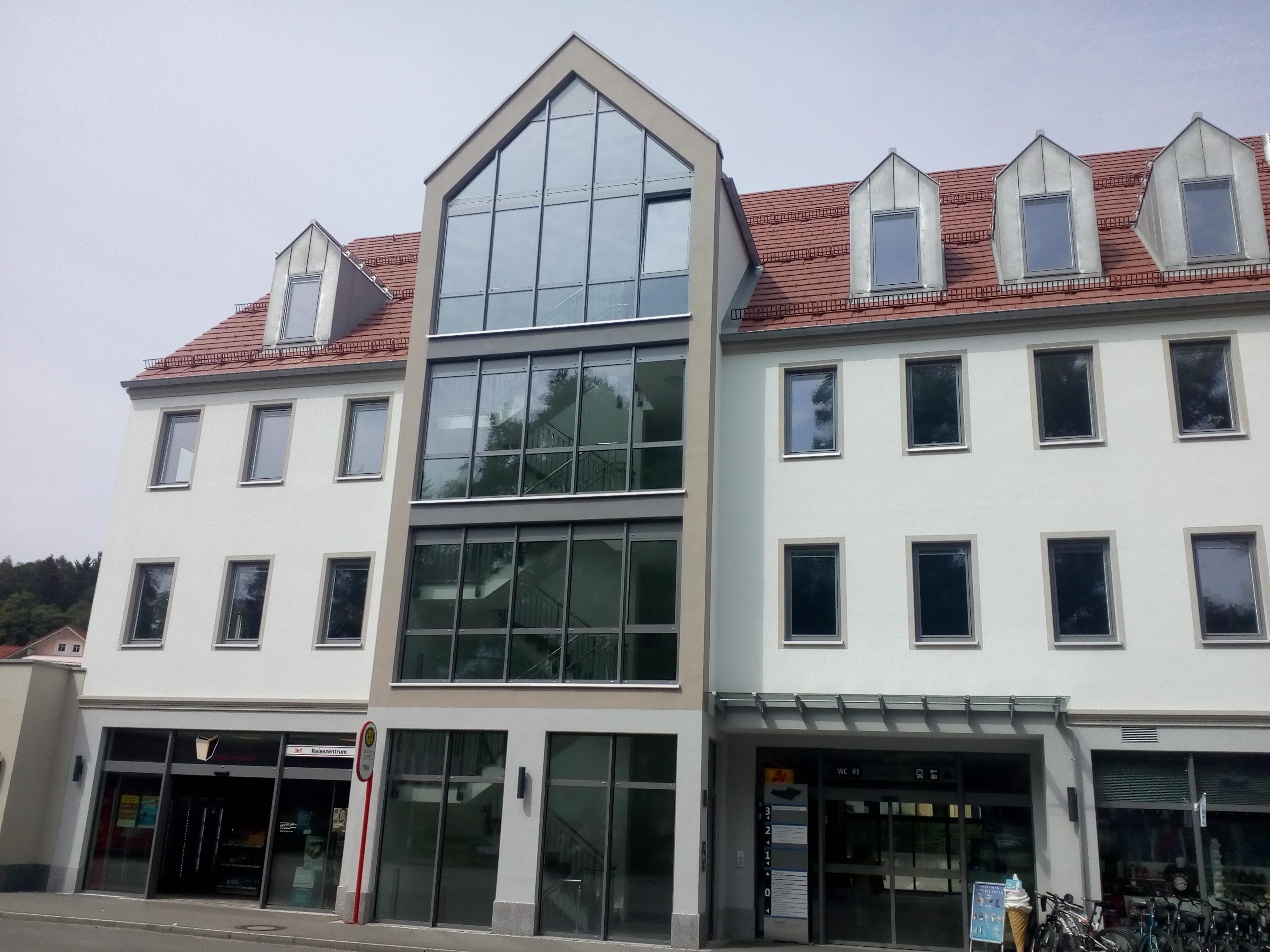 Bahnhofsgebäude Füssen (Neubau)